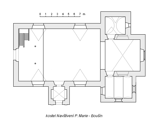 Boušín; půdorys kostela Navštívení Panny Marie